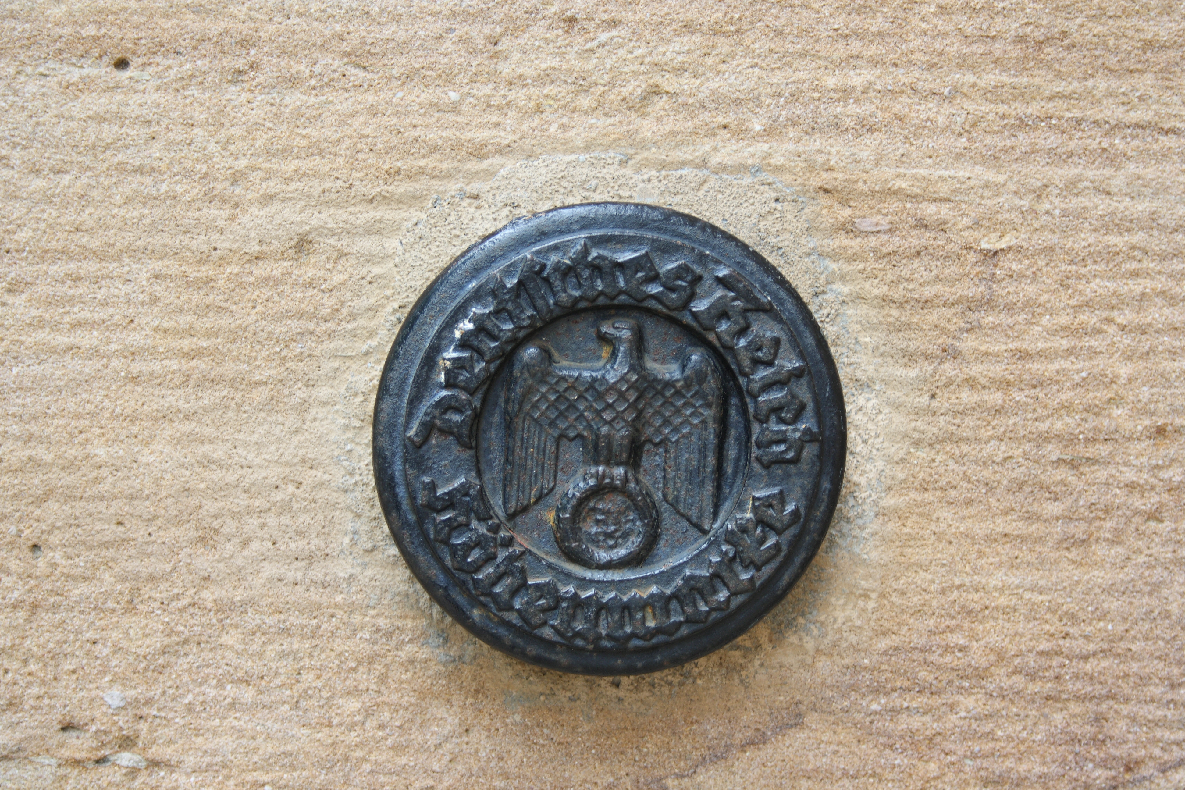 Höhenmarke an der evangelischen Stadtkirche in Lauterbach (Hessen), Marktplatz 10, Inschrift: Deutsches Reich Höhenmarke, mit Reichsadler